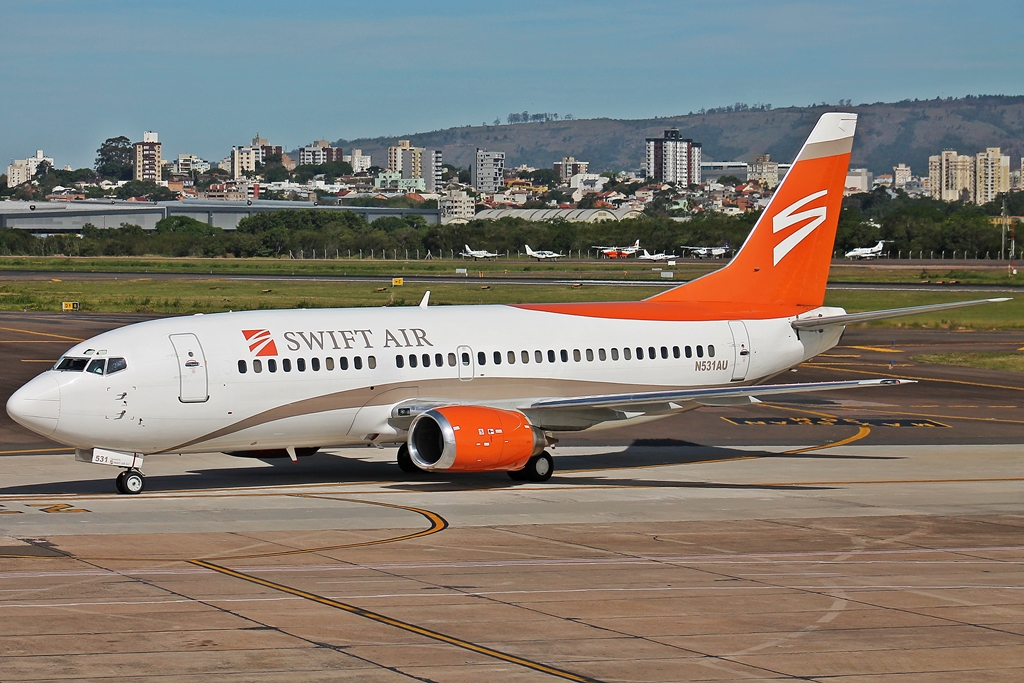 Aerosmith chegando em POA 737-300